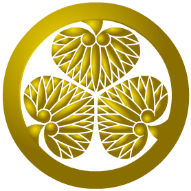 Tokugawa mon